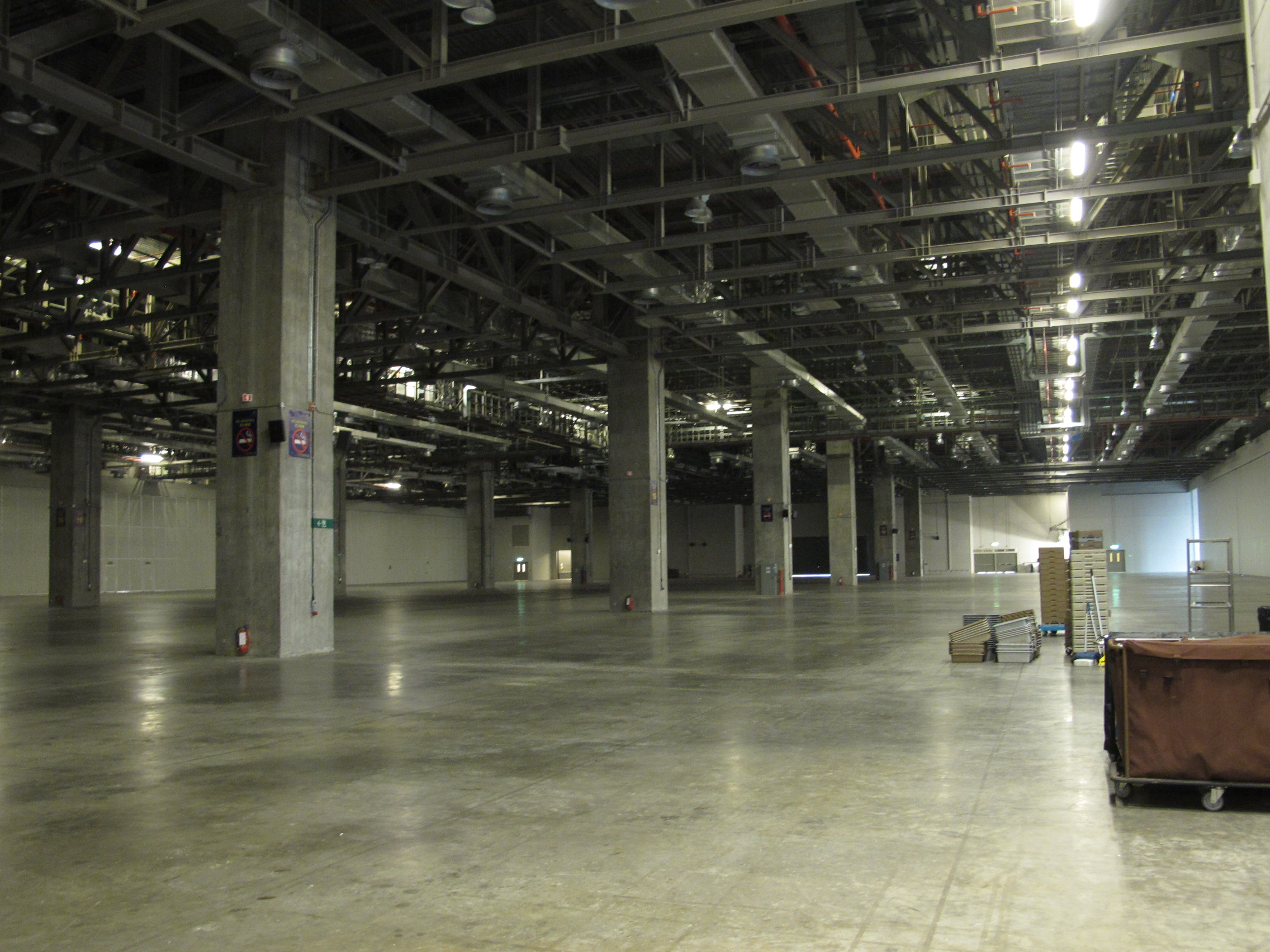 Cotai Expo Hall Interior